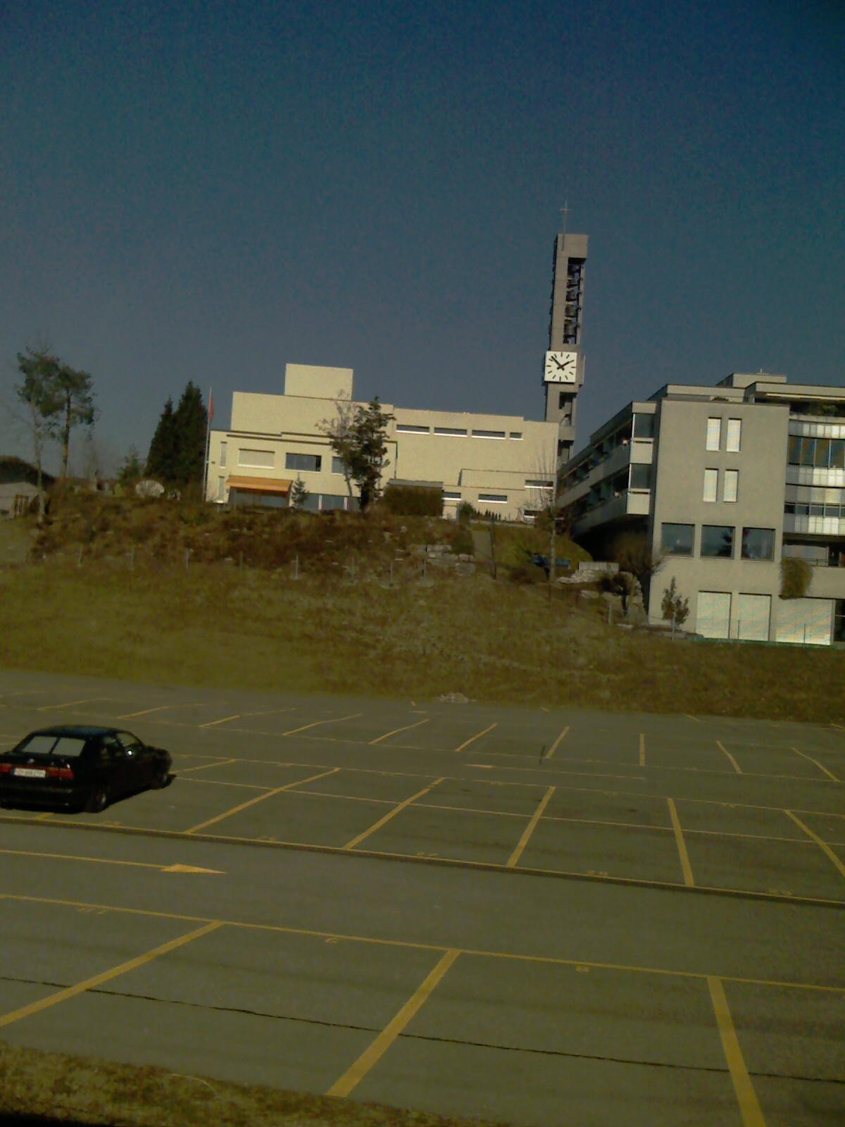 Katholic Church of Rüti ZH - Katolika Preĝejo de Rüti ZH